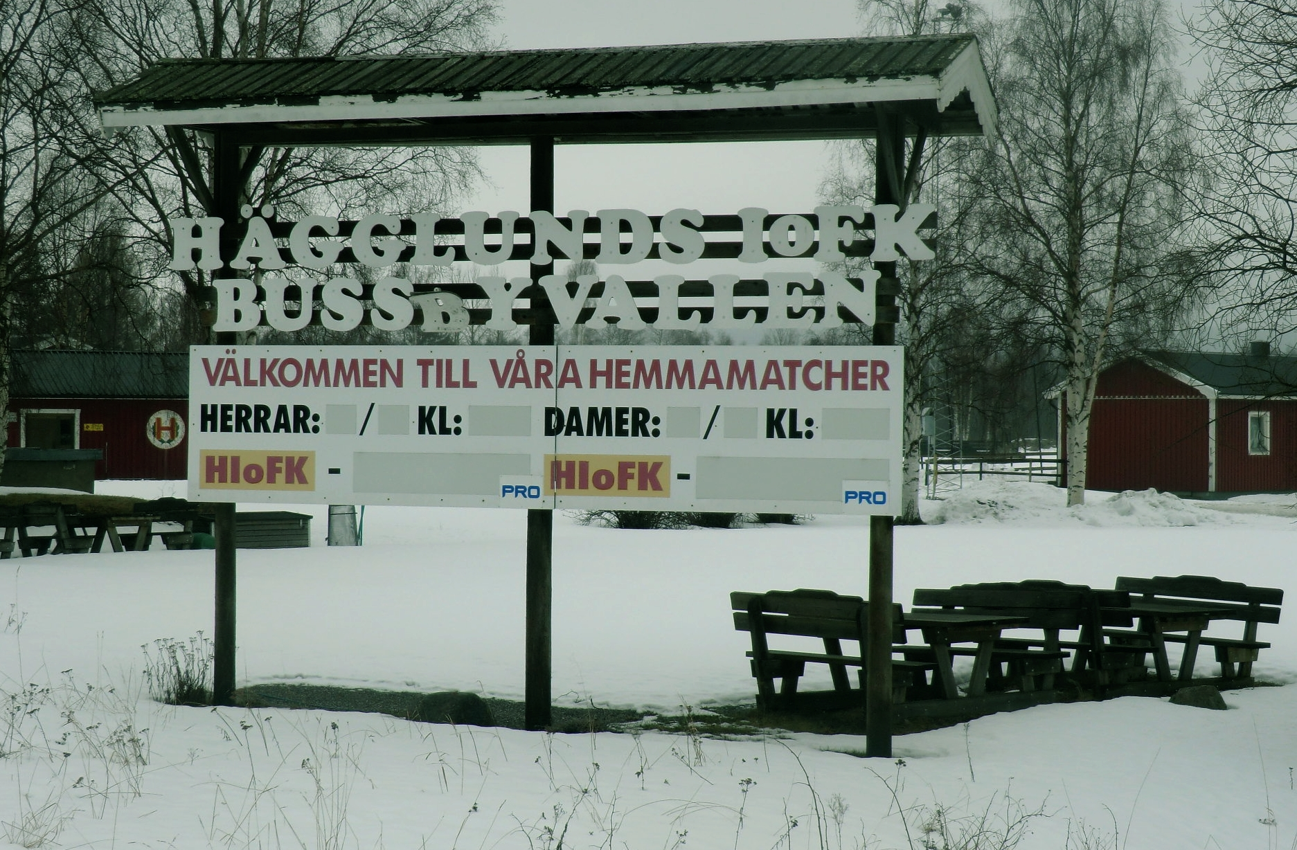 Välkomstskylt vid infarten till Bussbyvallen.